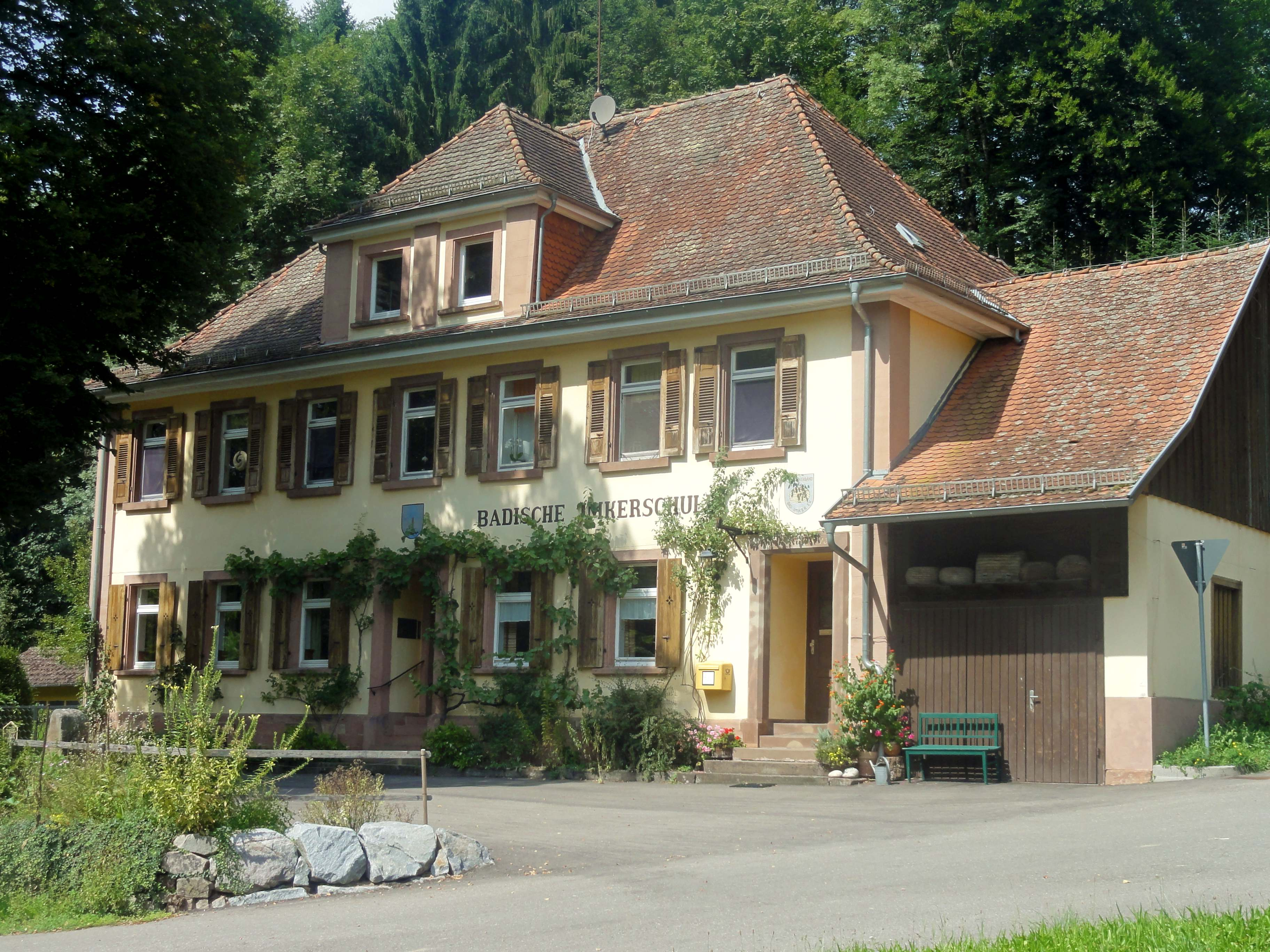 Zell am Harmersbach - Bildbeschreibung siehe Bildtitel.